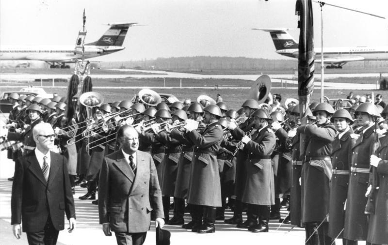 ADN-ZB/Koard/30.3.1978/Berlin: Besuch Kreisky/Der Bundeskanzler der Republik Österreich, Dr. Bruno Kreisky (r.), traf am 30.3.1978 zu einem offiziellen Besuch der DDR in Berlin ein. Auf dem Flughafen Berlin-Schönefeld wurde er vom Vorsitzenden des Ministerrates der DDR, Willi Stoph (l.), dessen Einladung er folgt, Willkommen geheißen. Nach der Ankunft des österreichischen Regierungschefs schritten beide Repräsentanten die Ehrenformation der NVA ab.